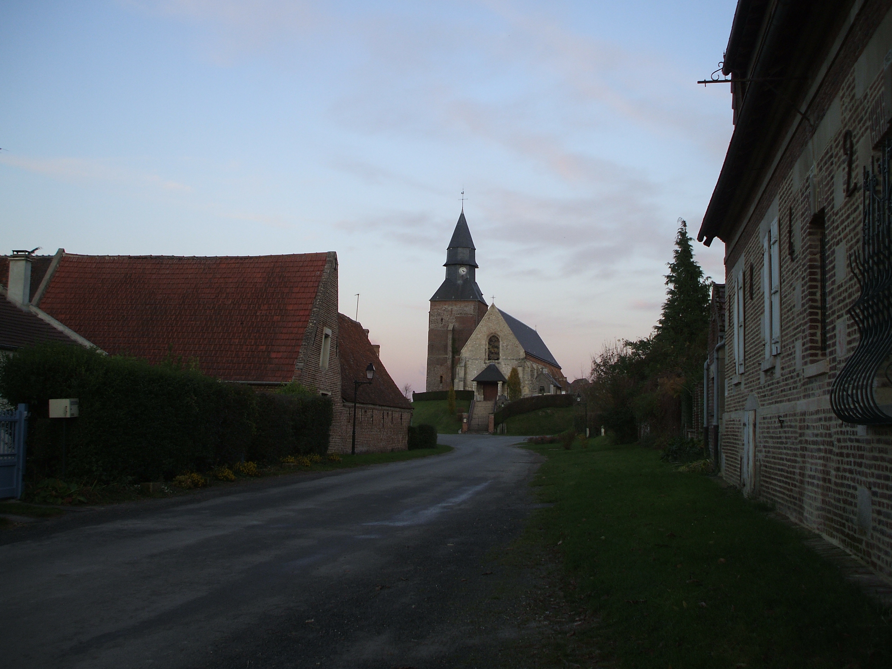 église de Silly-Tillard oise france